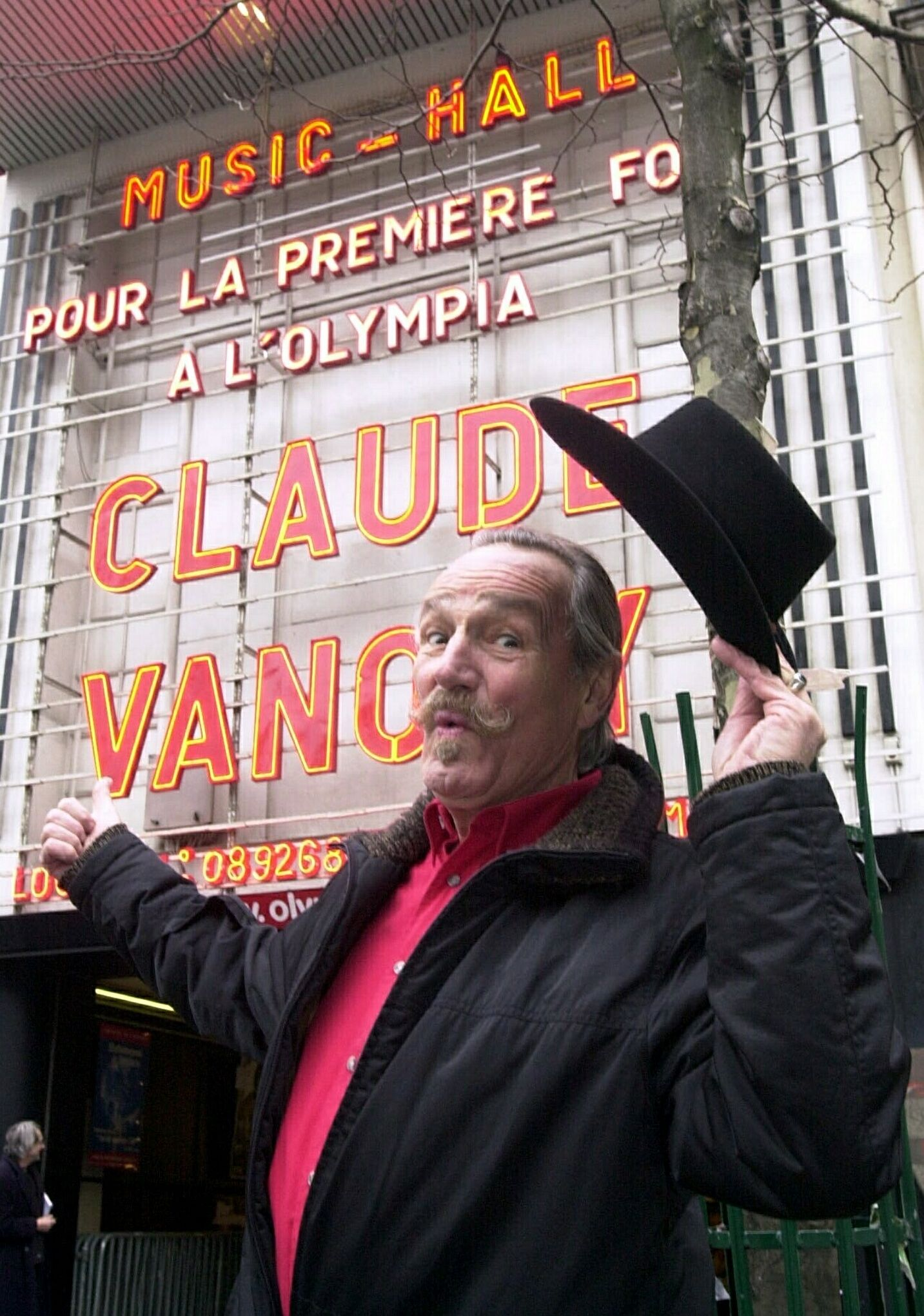 Claude Vanony devant la salle mythique de l'Olympia pour sa toute première représentation en 2003